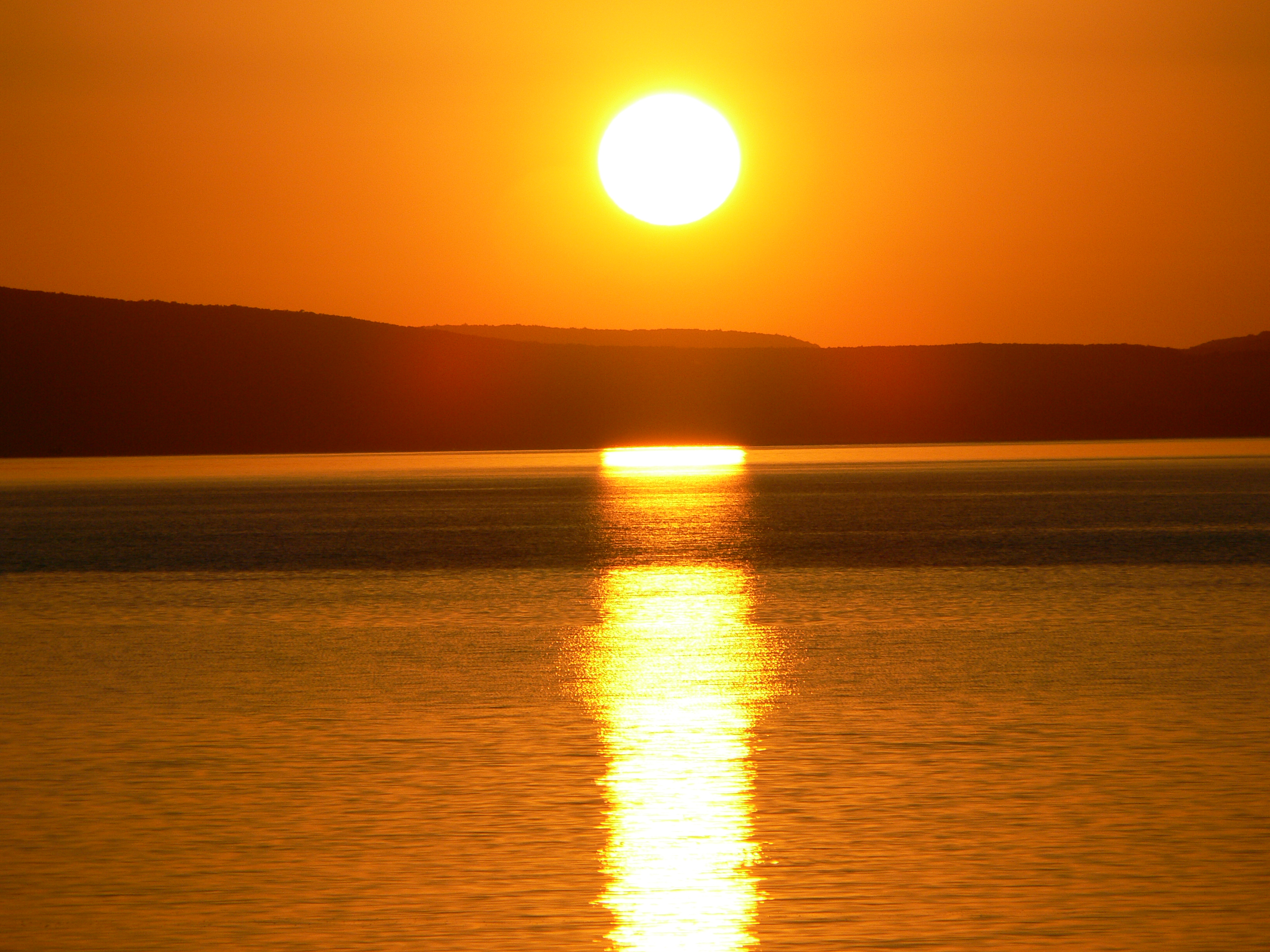 Balatonföldvár, naplemente